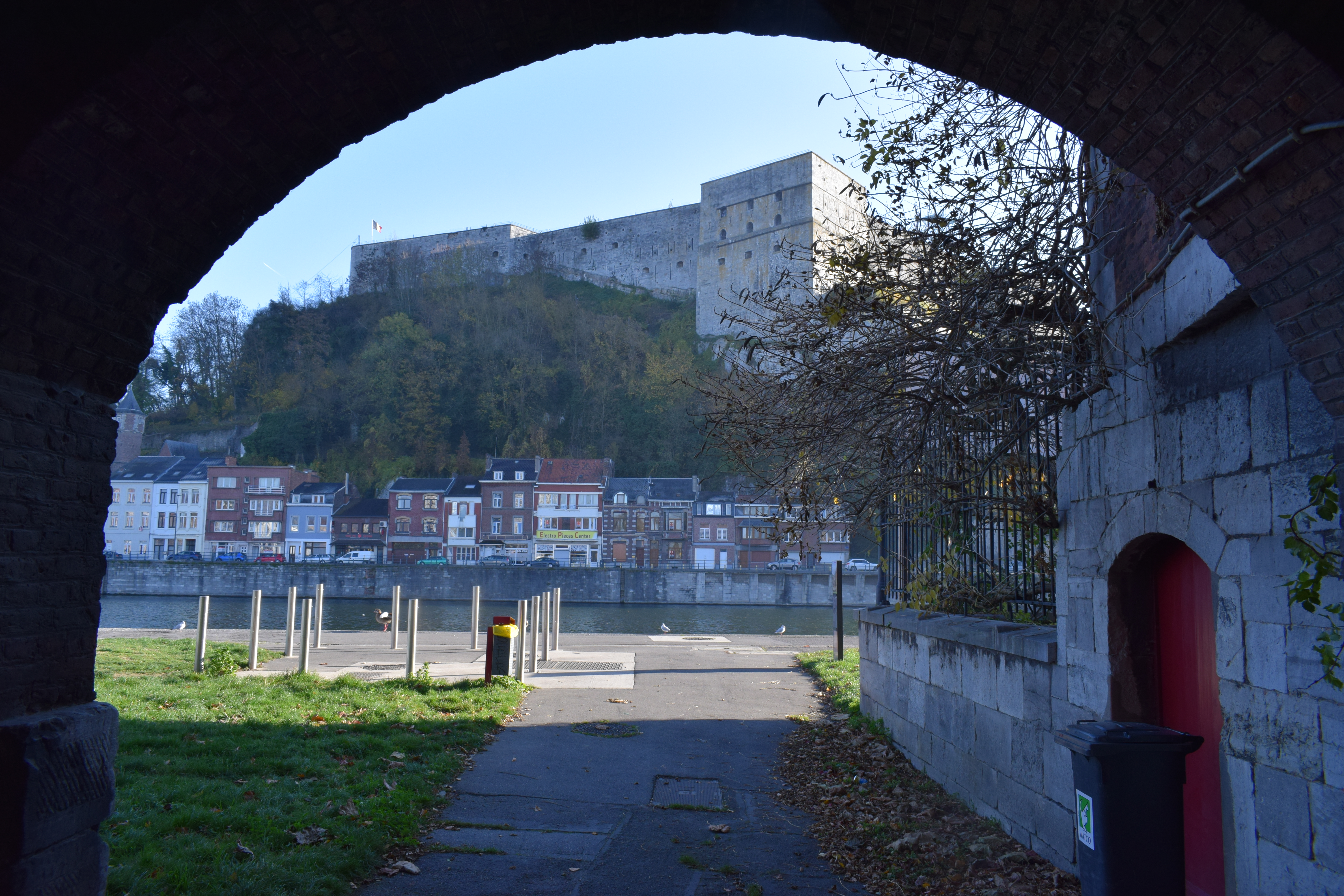 Vue de l'avenue de Batta, sur la rive gauche de la Meuse à Huy.